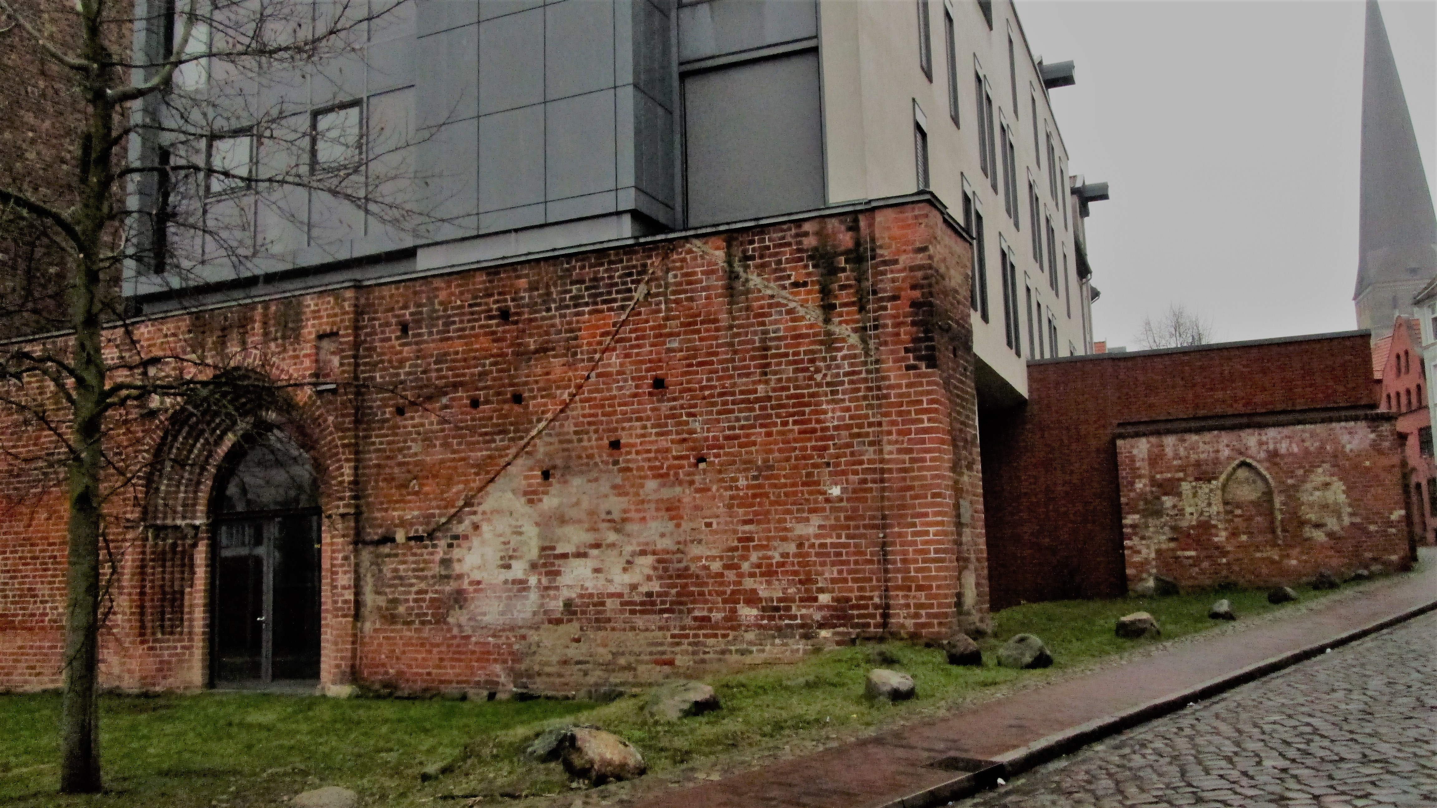 Katharinenkloster Rostock / Hochschule für Musik und Theater Rostock - Westwand mit dem Eingangsportal und südlicher Kapellenanbau der Klosterkirche der Franziskaner (spätes 13. Jahrhundert)